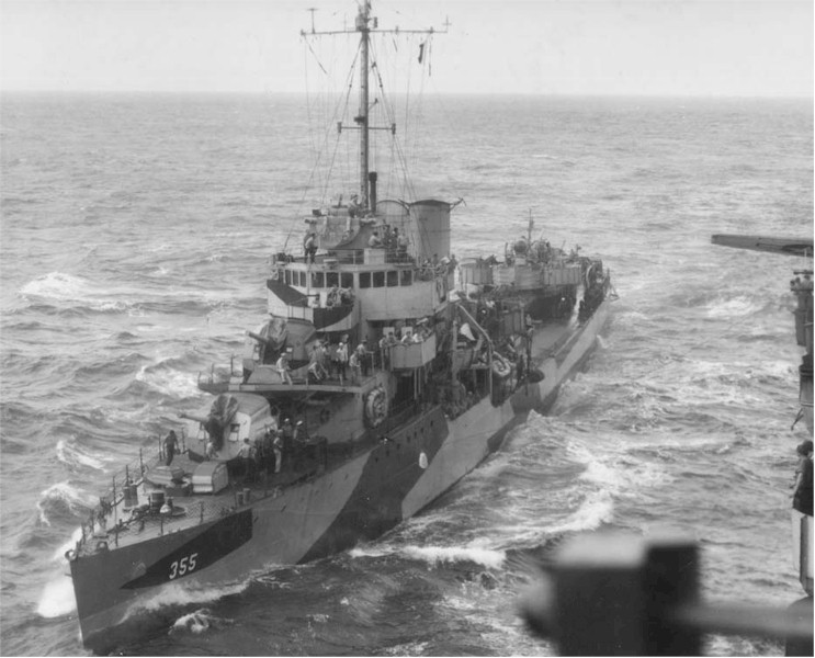 USS Aylwin (DD-355).